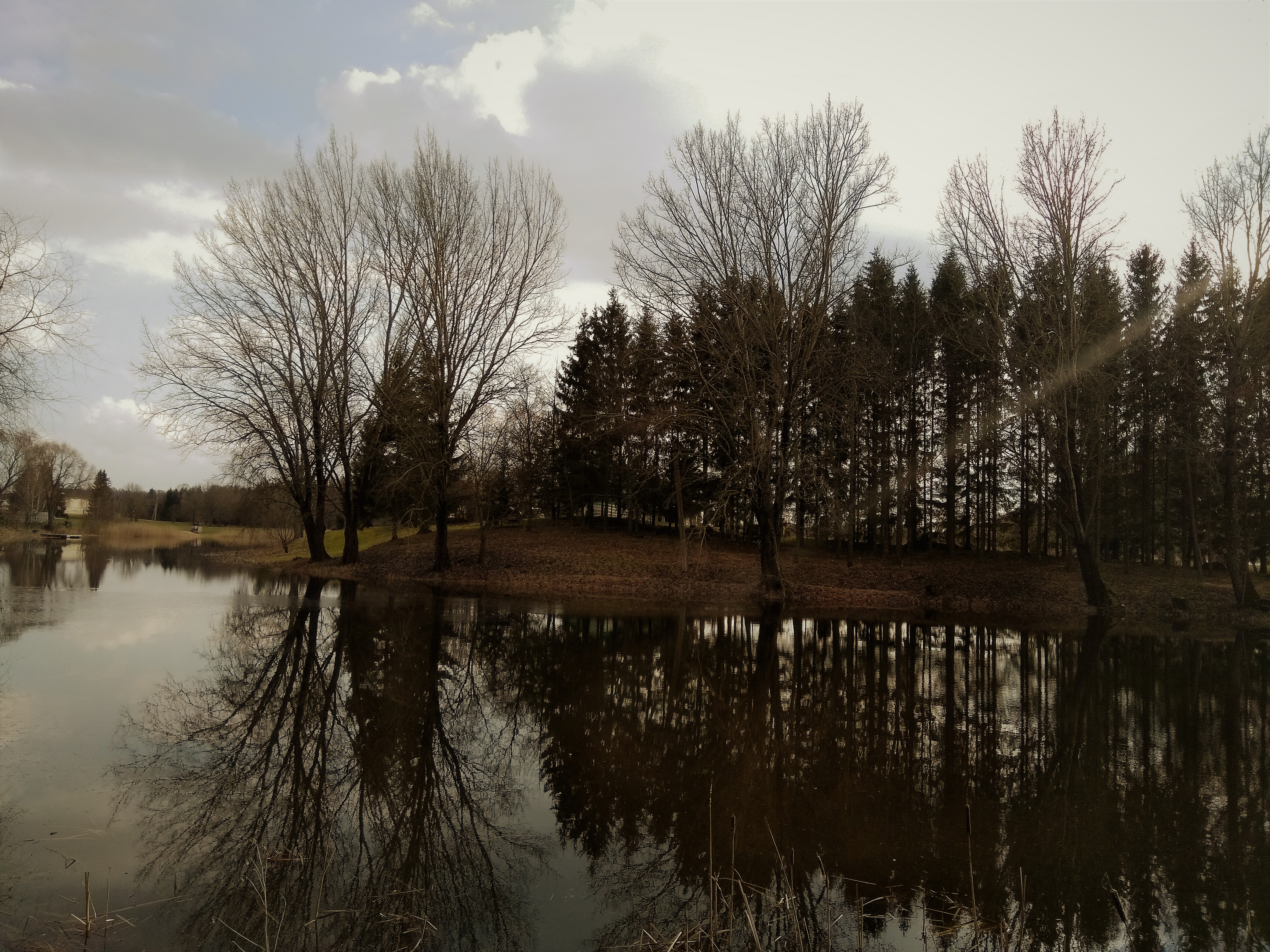 Vaade põhjasuunast üle veskipaistiigi linnuseala põhjaküljele.